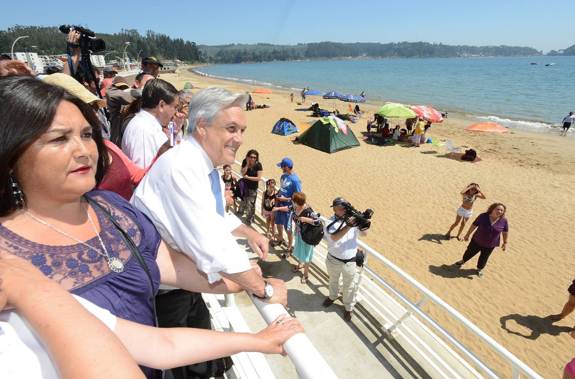 26-02-2013 Inauguración Costanera de Dichato